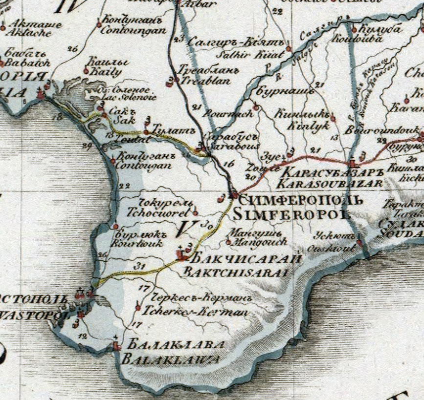 Симферопольский уезд Таврической губернии, карта 1822 года